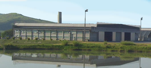 Hangar do B Mnt Sup Av Ex